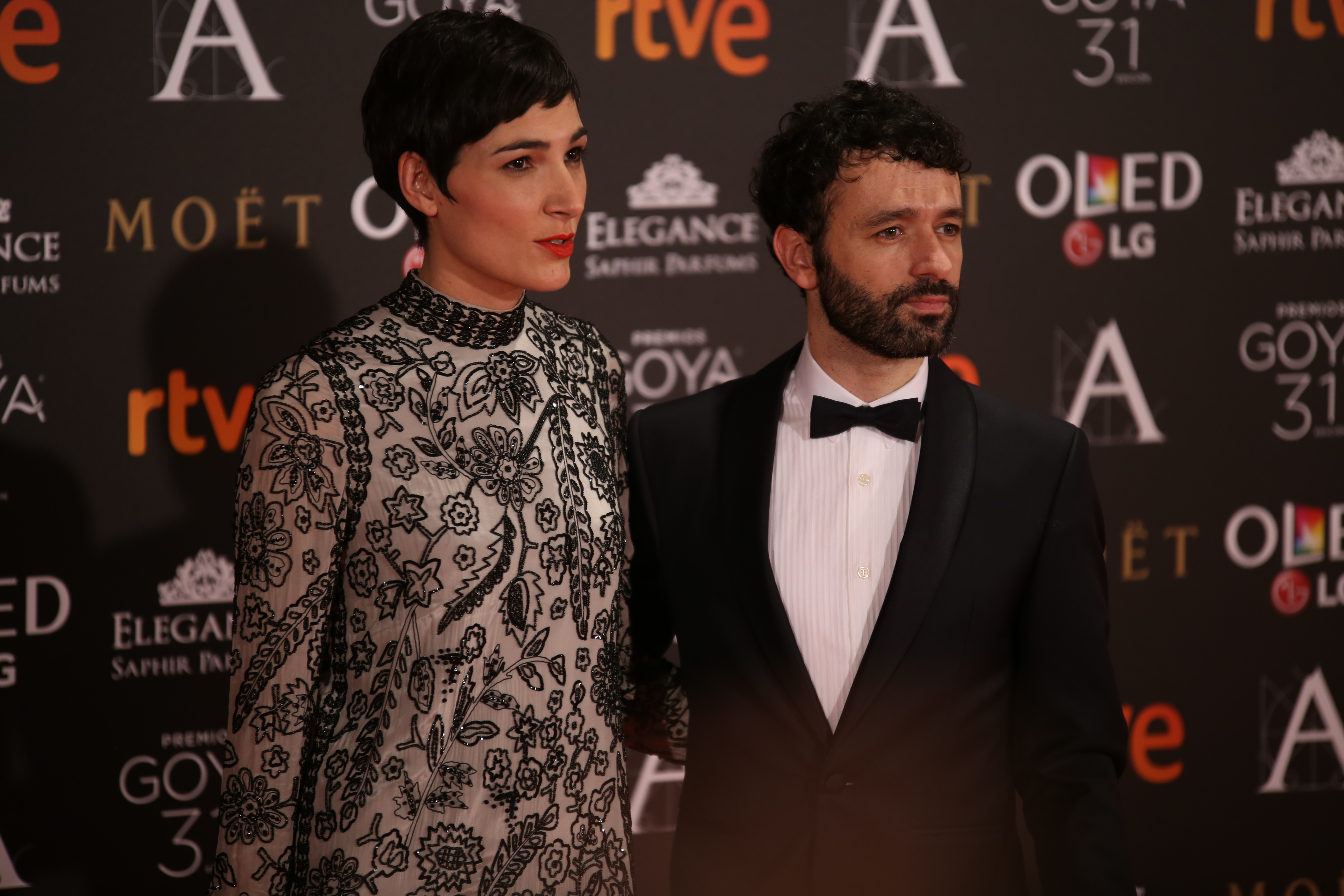 Premios Goya 2017